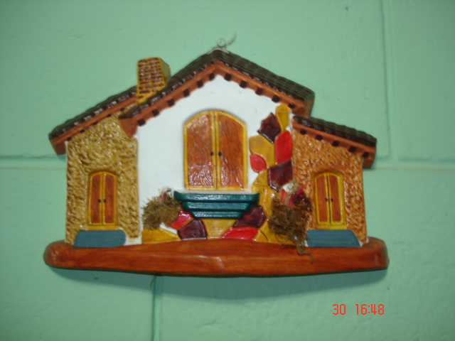 Artesanías de La Palma (Chalatenango)